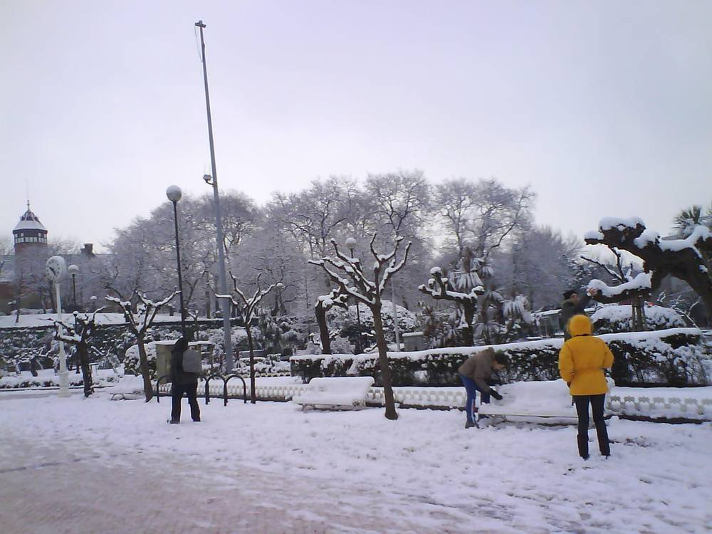 Ondarretako lorategiak, 2009ko elurtean zuritu zirenean